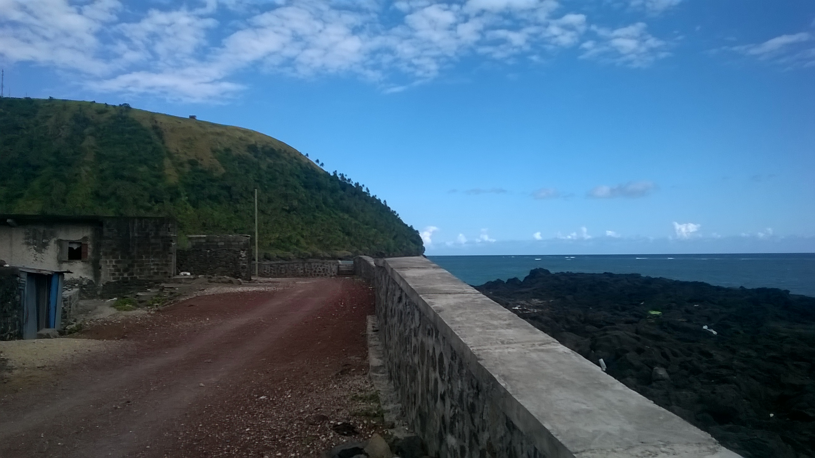 Village de Mbachilé